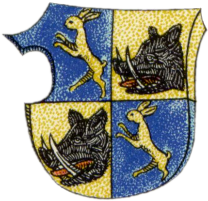 Znak Jana Zajíce z Hazmburku a na Budyni